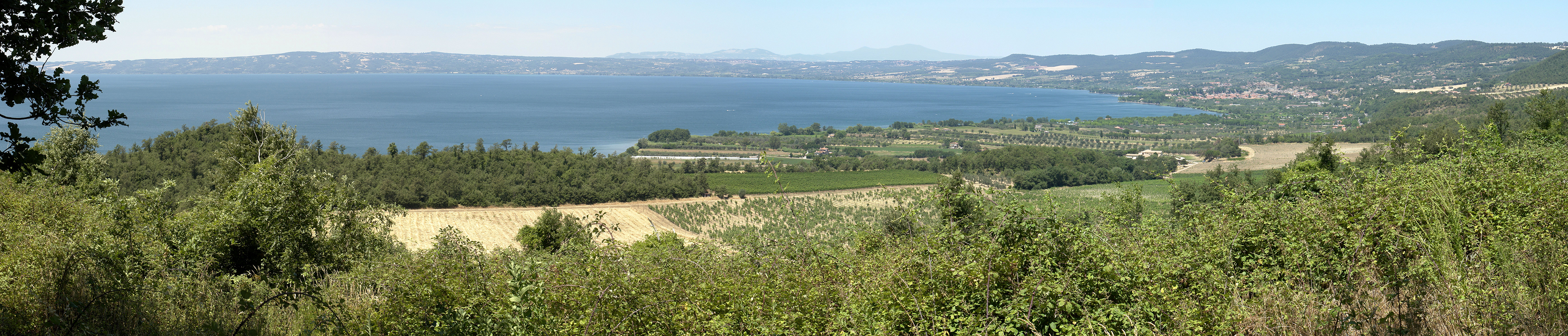 Bolsenasee (Panorama Nordhälfte, Blick auf Bolsena)